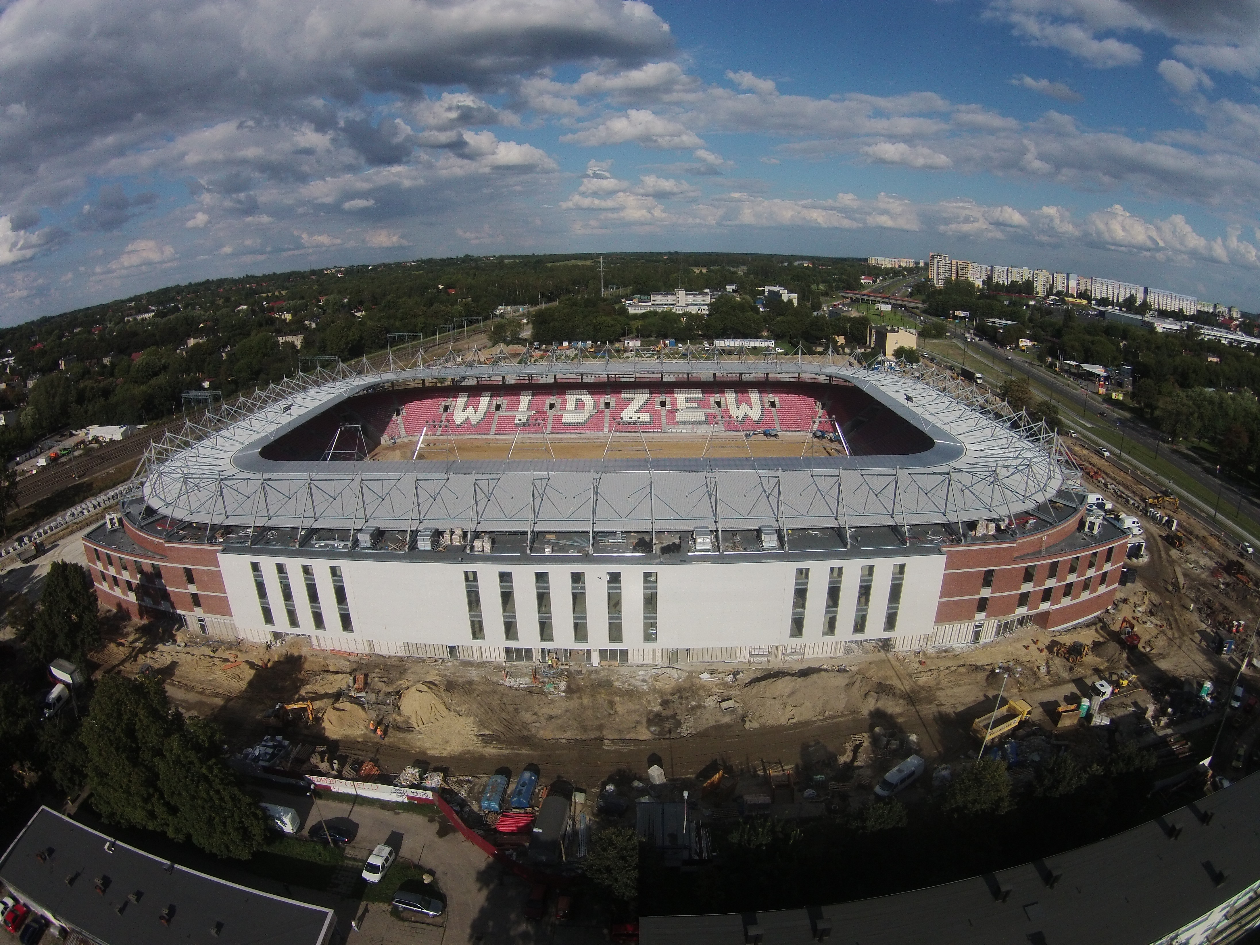 Stadion Widzewa w budowie - Łódź 11 sierp.2016